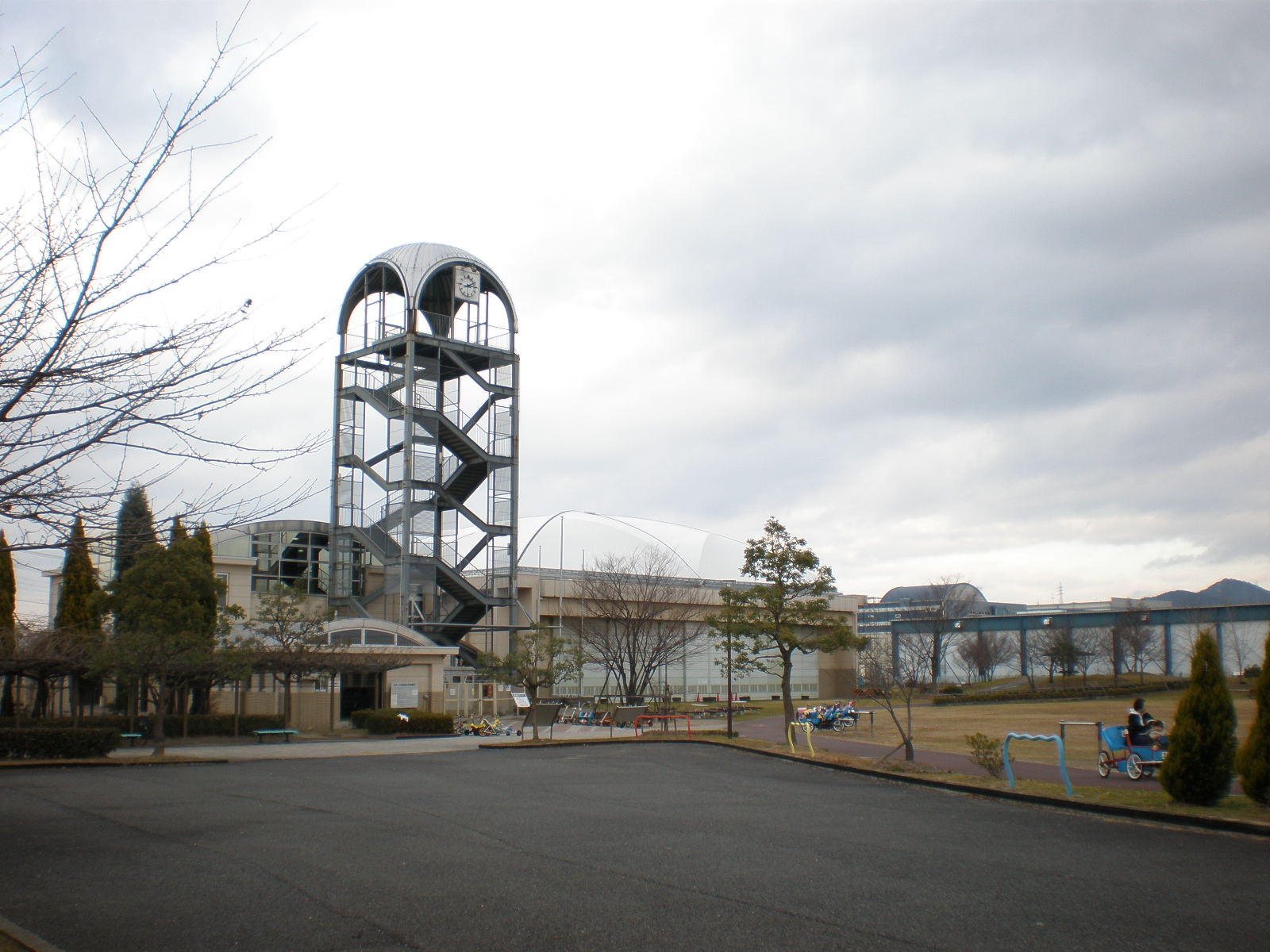 愛知県小牧市にあるフレッシュパーク